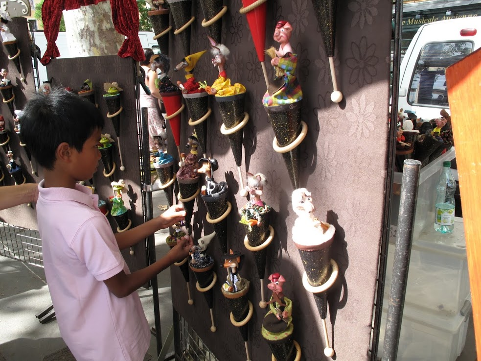 Guignol, main character in a French puppet show, on the street market in Lion